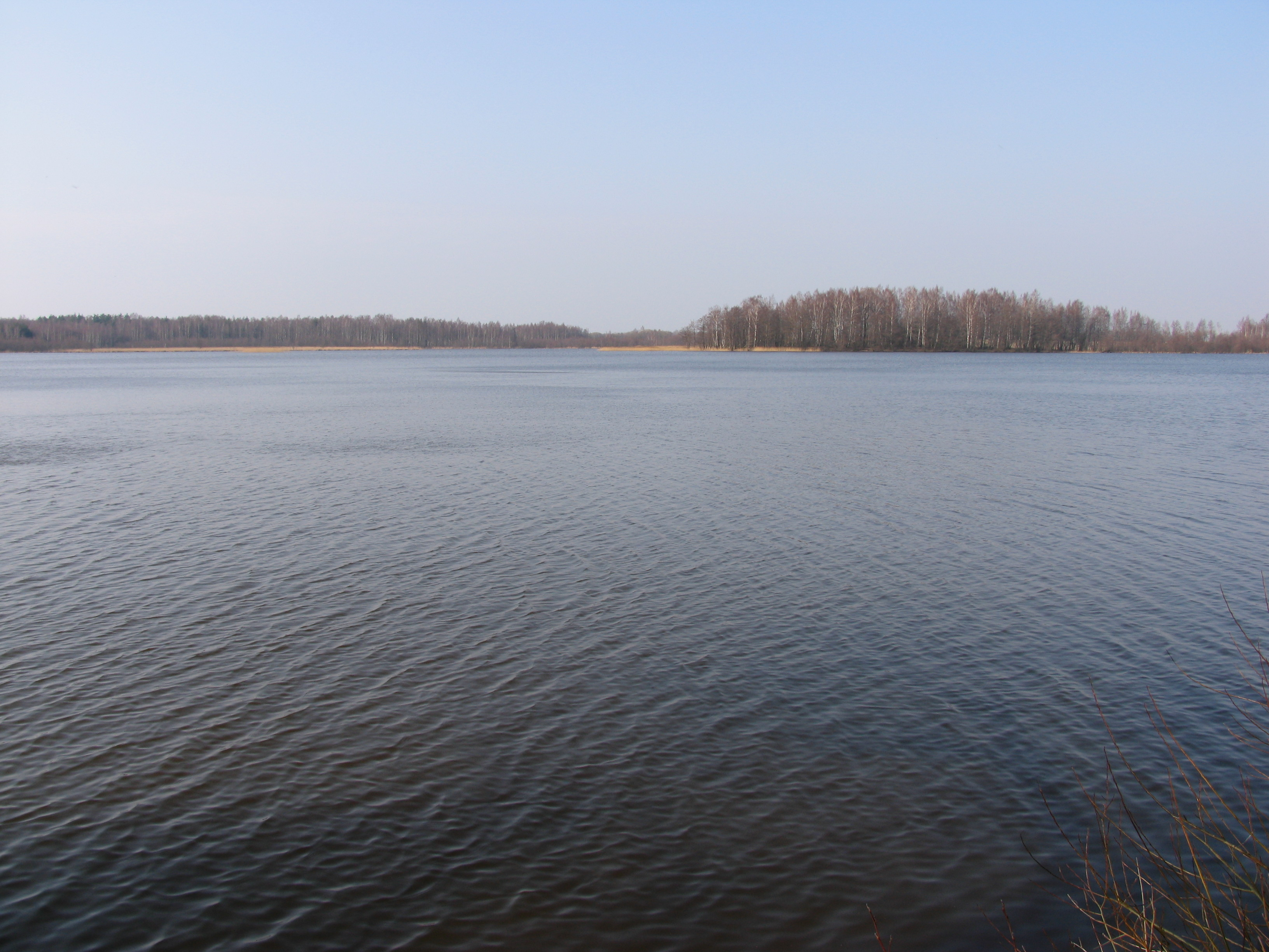 Kalotės ežeras – ežeras vakarų Lietuvoje, Klaipėdos rajone